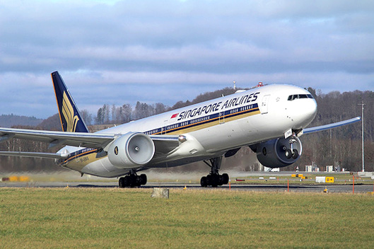 Singapore Airlines Boeing 777-300 9V-SWA